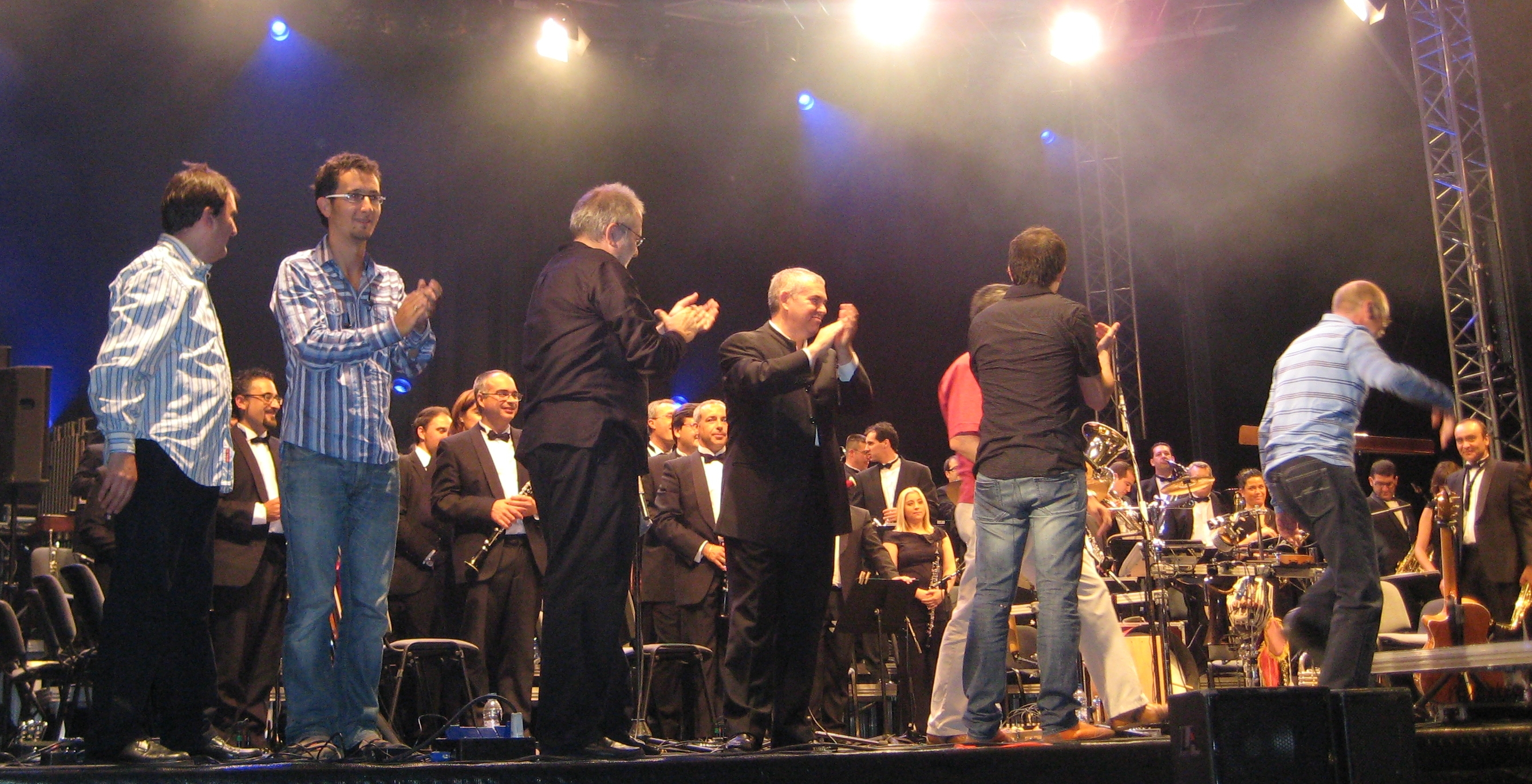 Aplausos tras un concierto de Oskorri con la Banda de Música Municipal de Bilbao. En primer plano, los miembros de Oskorri con el director de la banda.